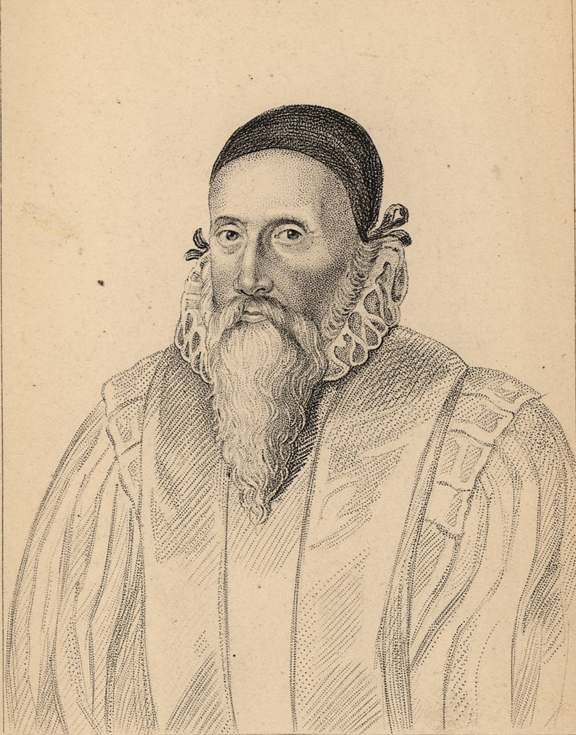 John Dee (1527 – 1608 or 1609)